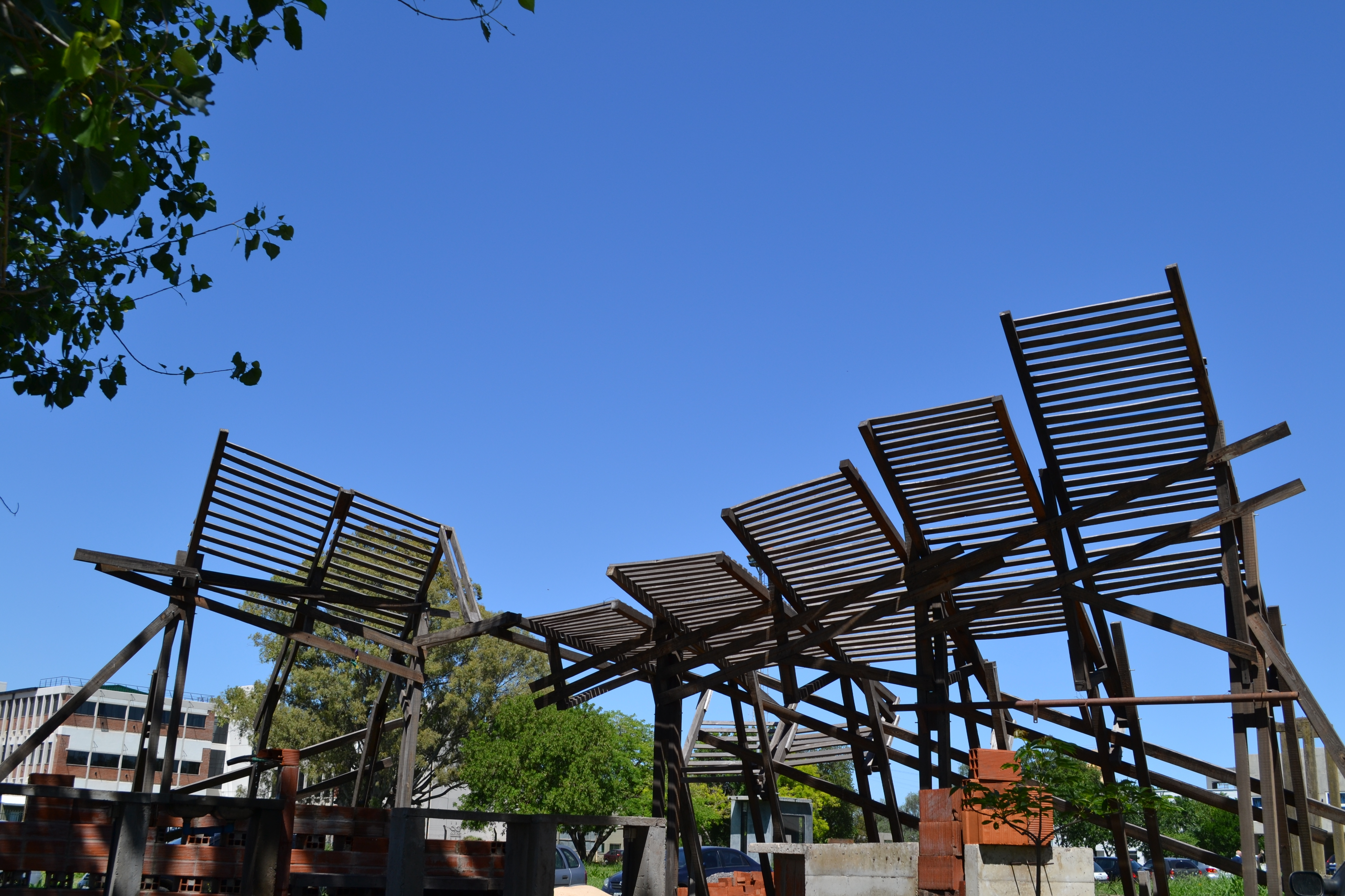 Club social Carlos Galli